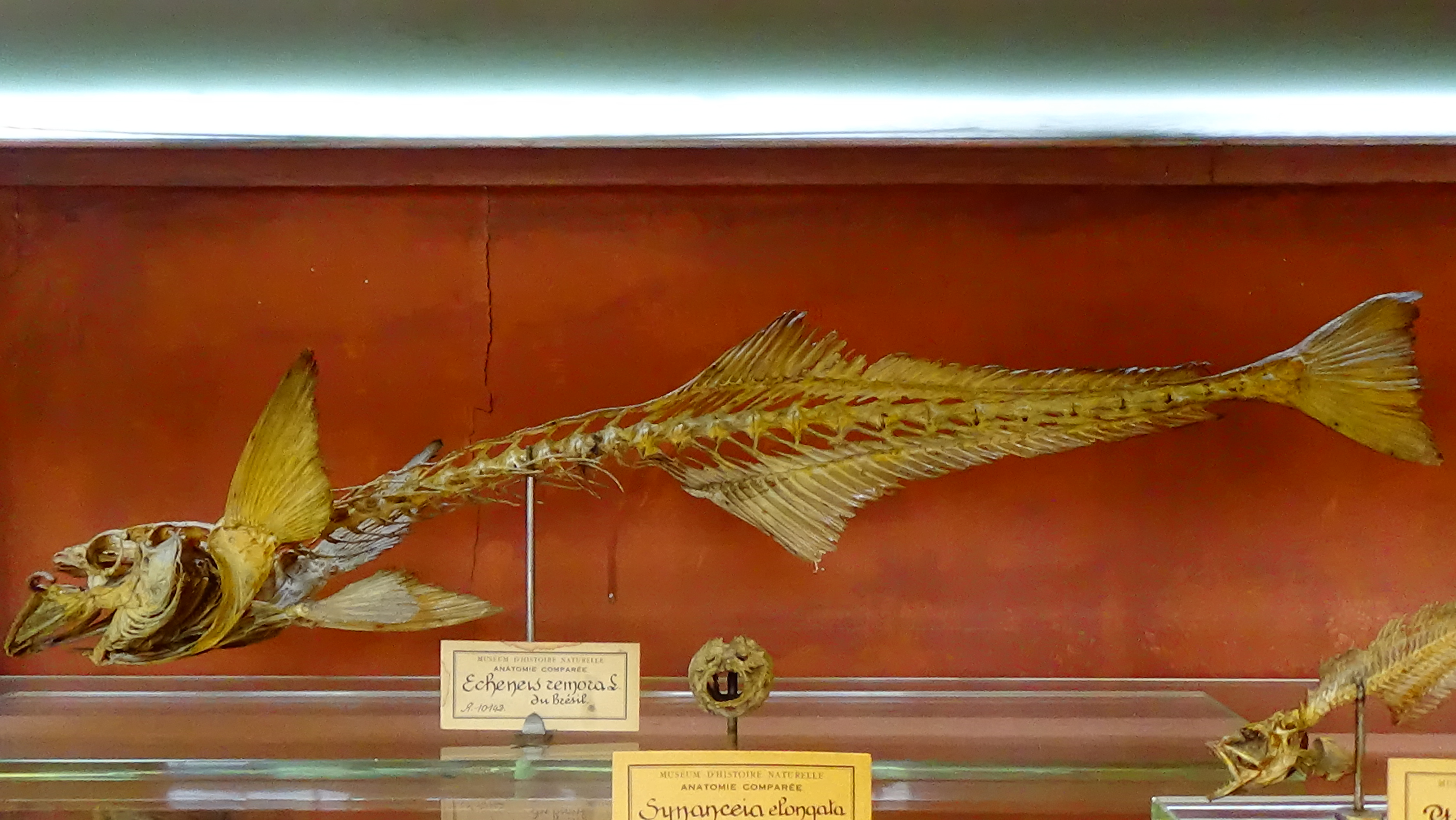 Remora remora - Echenois remora - squelette mnhn Paris